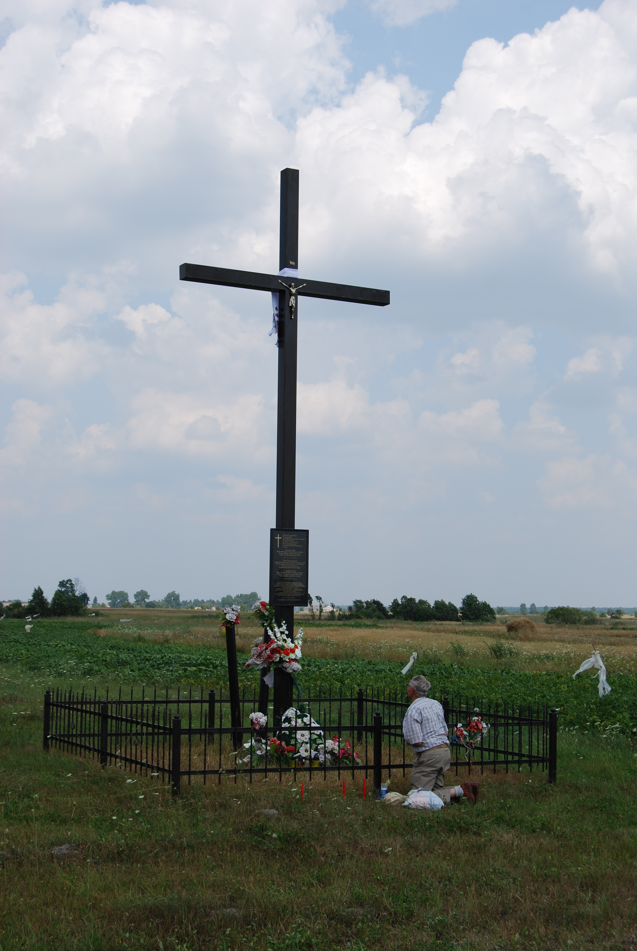 Wyrka. Krzyż i tablica pamiątkowa na miejscu kościoła katolickiego p.w. Podwyższenia Krzyża Świętego w Wyrce. Kościół został spalony przez nacjonalistów ukraińskich w dniach 16-17.VII.1943 r. podczas ataktu na ośrodek samoobrony w Hucie Stepańskiej i okoliczne miejscowości.